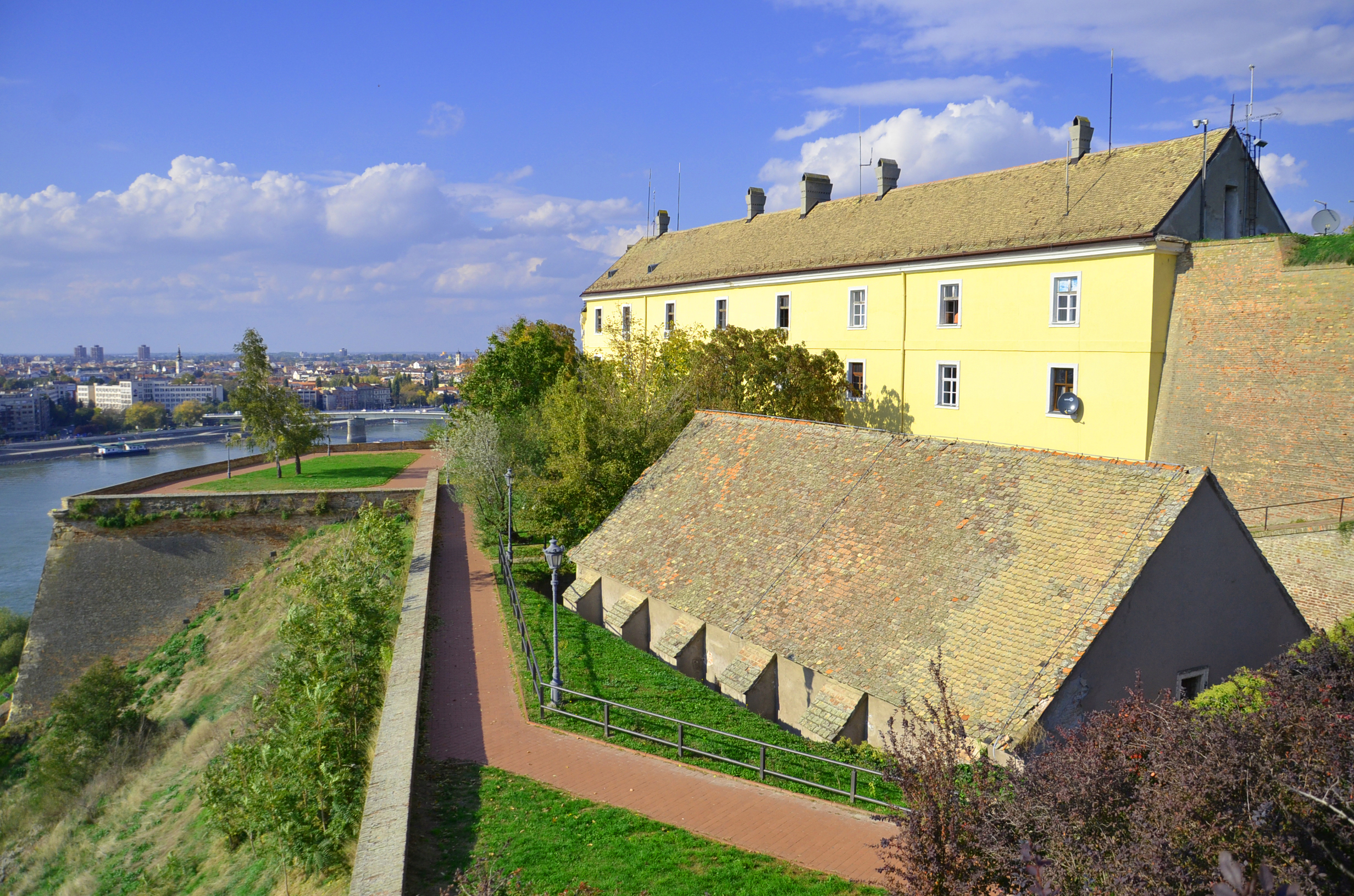 Ненад Шегуљев